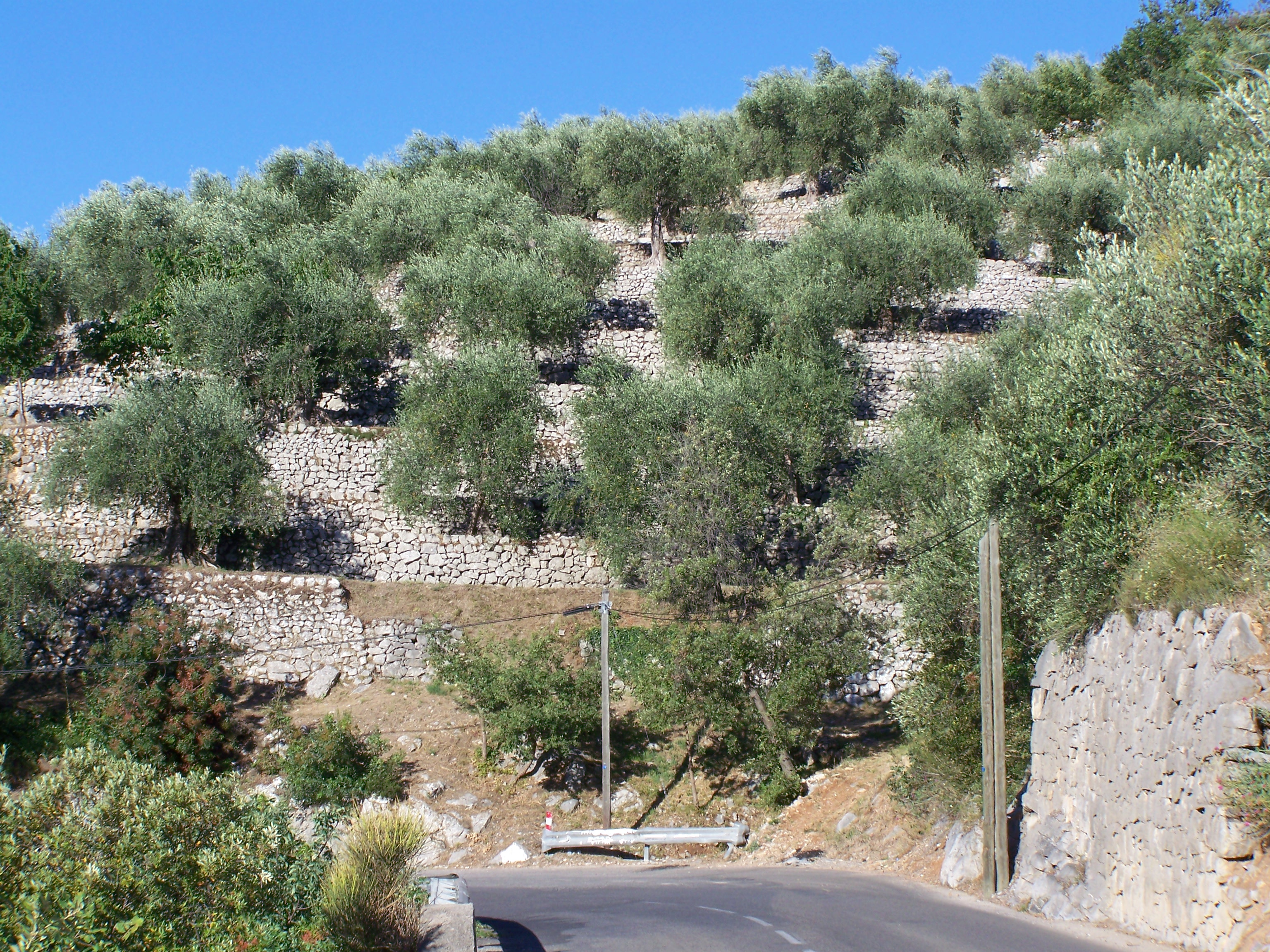 Oliveraie cultivée en terrasses ("restanques") dans le quartier de la "Porte Rouge" du village de Levens (Alpes-Maritimes, France)